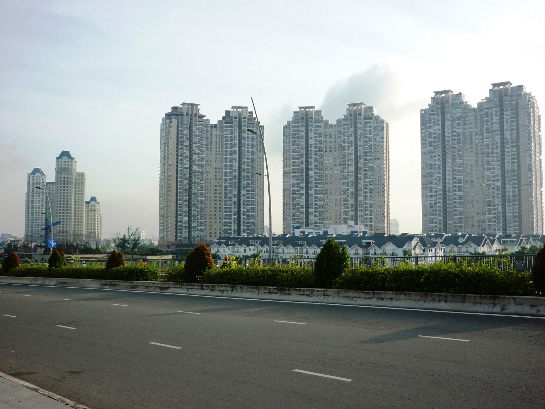 Khu phức hợp Saigon Pearl trên đường Nguyễn Hữu Cảnh